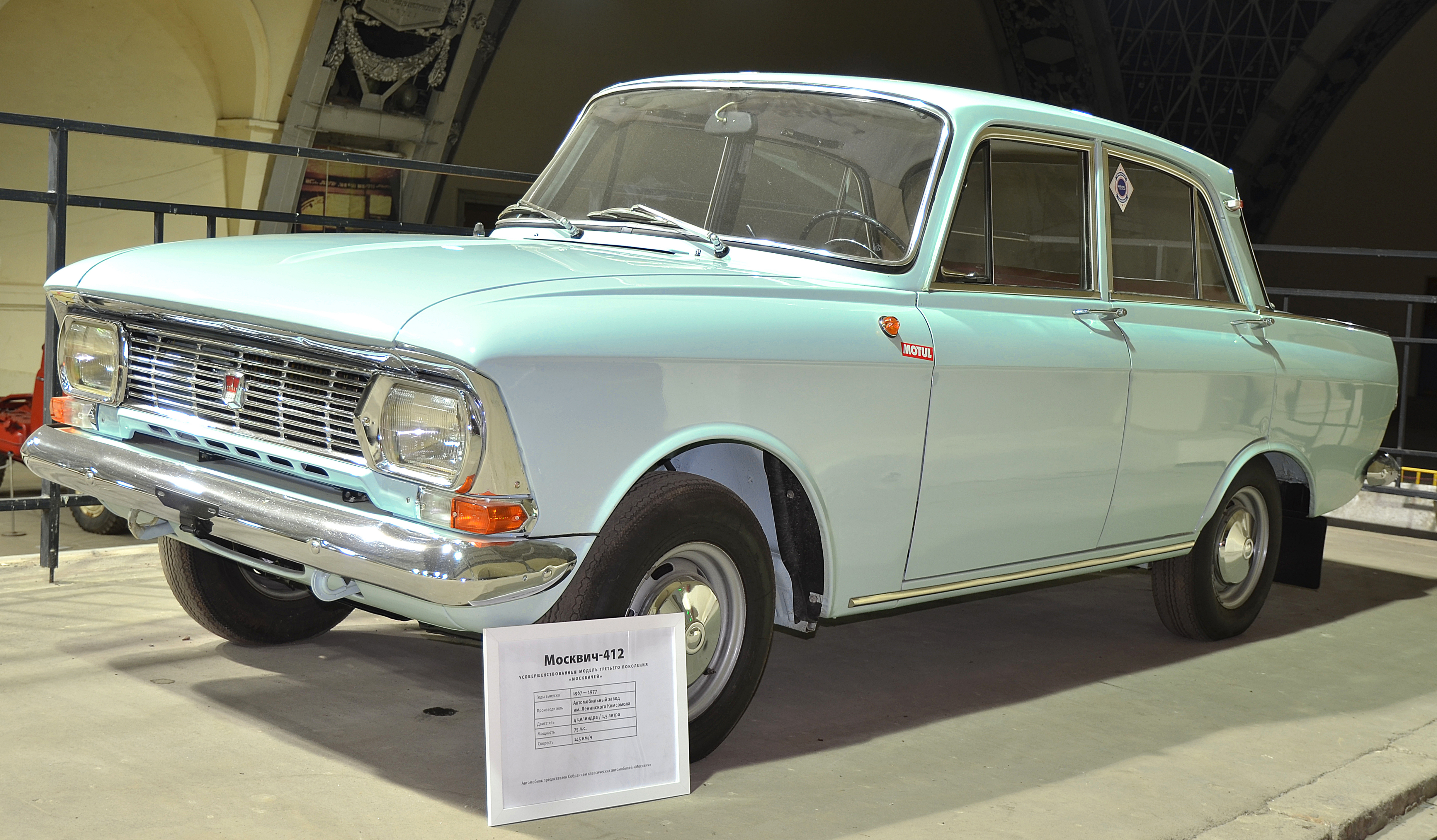 Можно увидеть здесь : You can see here